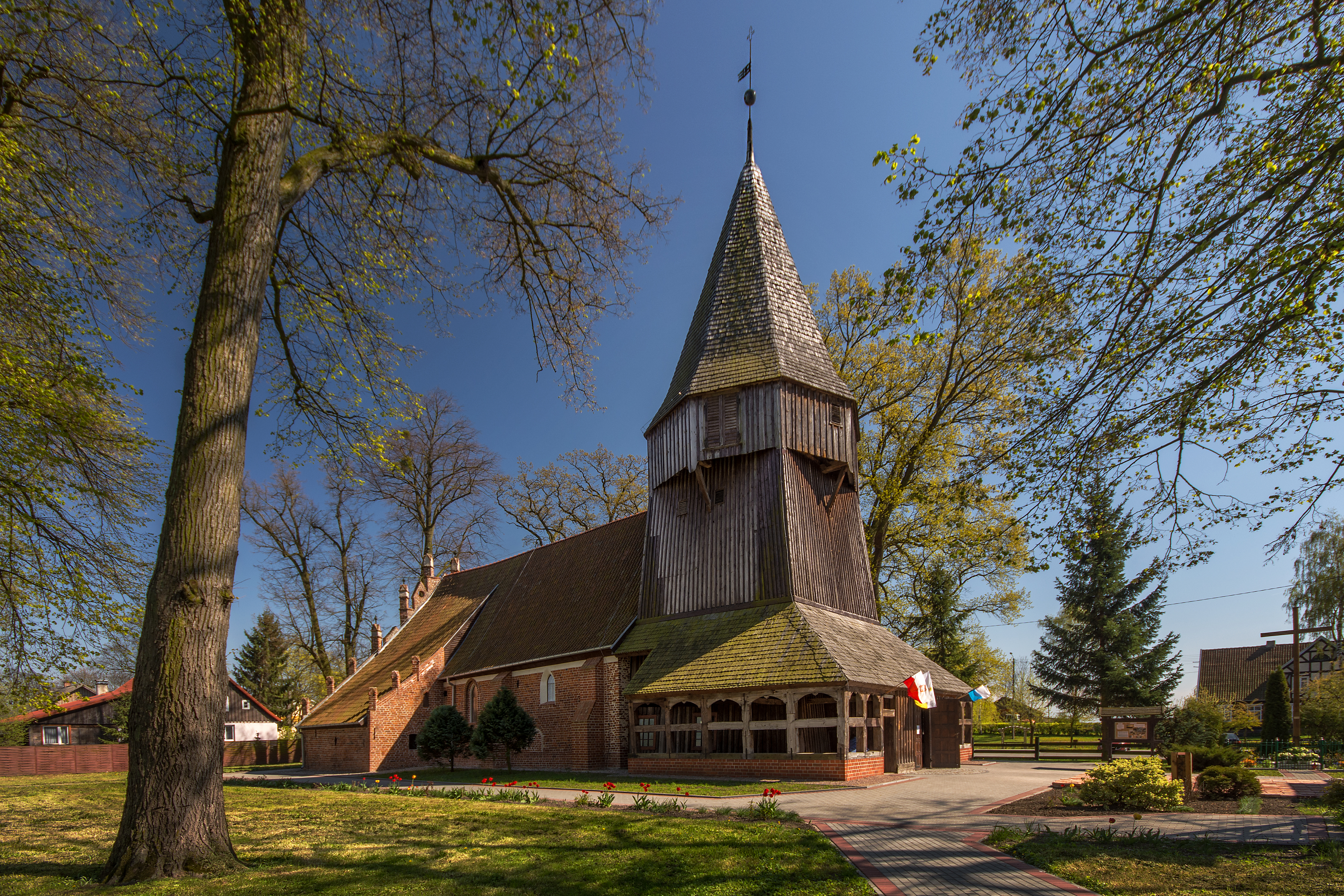 Kmiecin, kościół par., ob. punkt muzealny, 1344, wieża - 1754